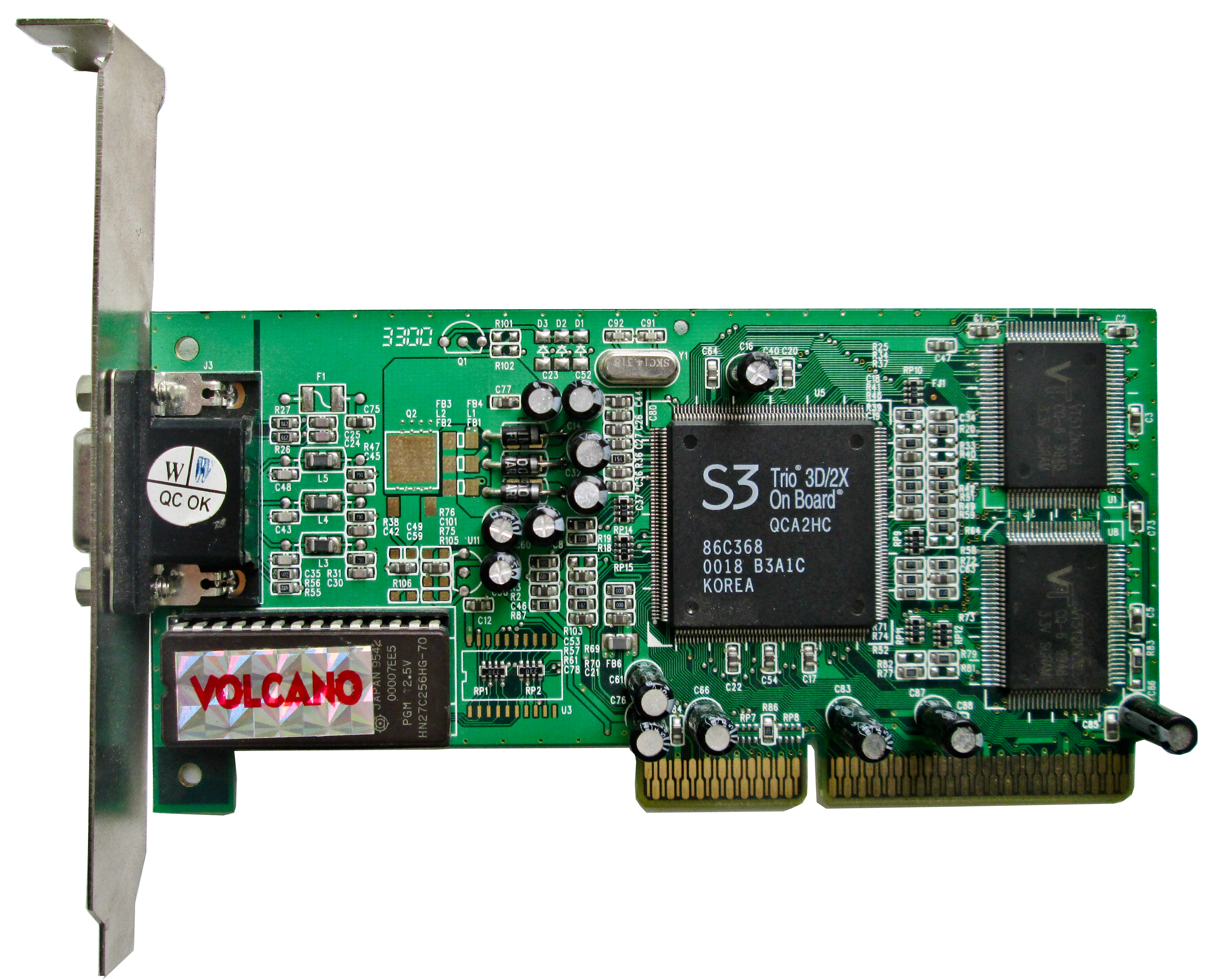 Видеокарта PCI из линейки S3 Trio